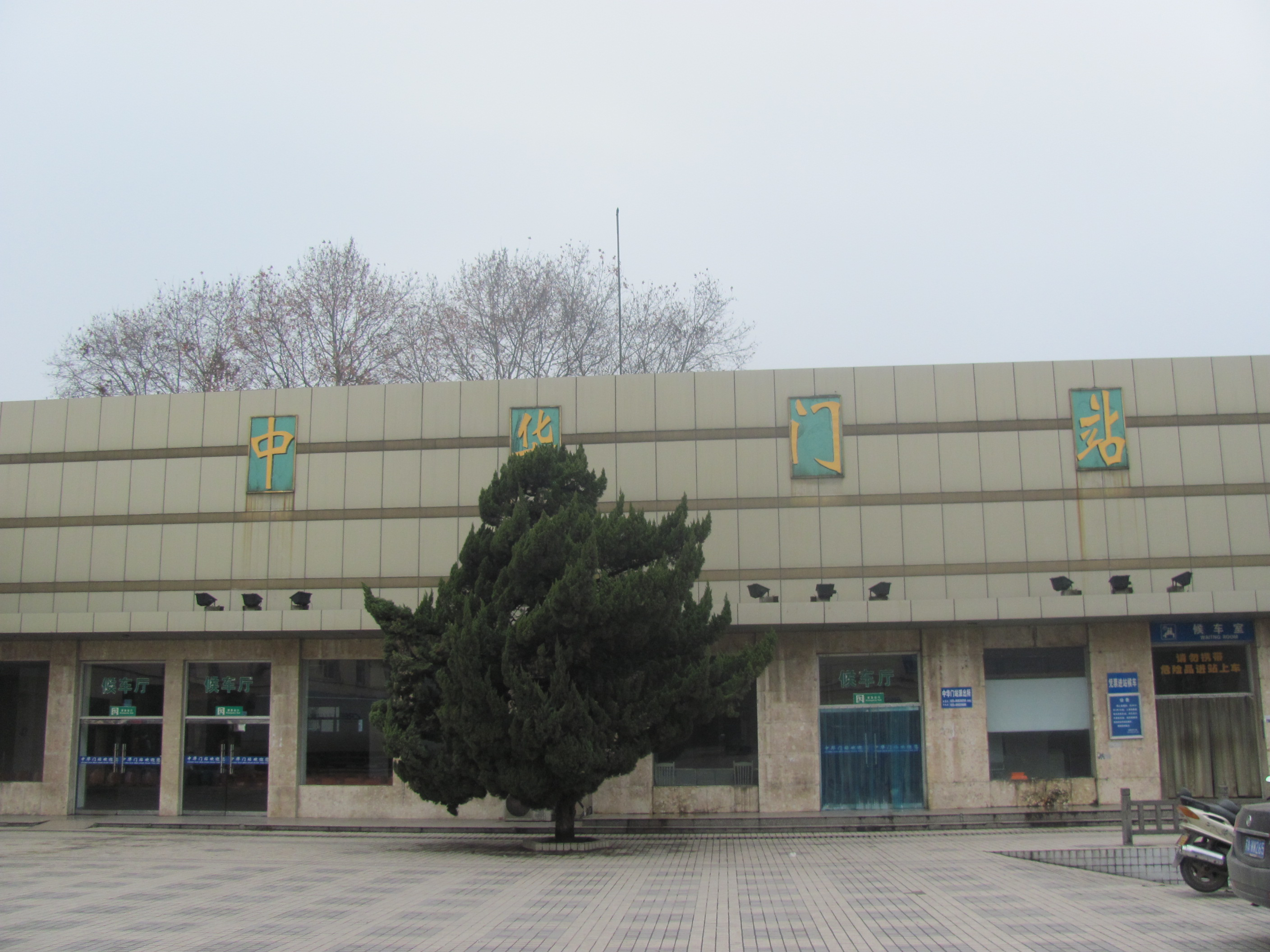 中华门车站外景